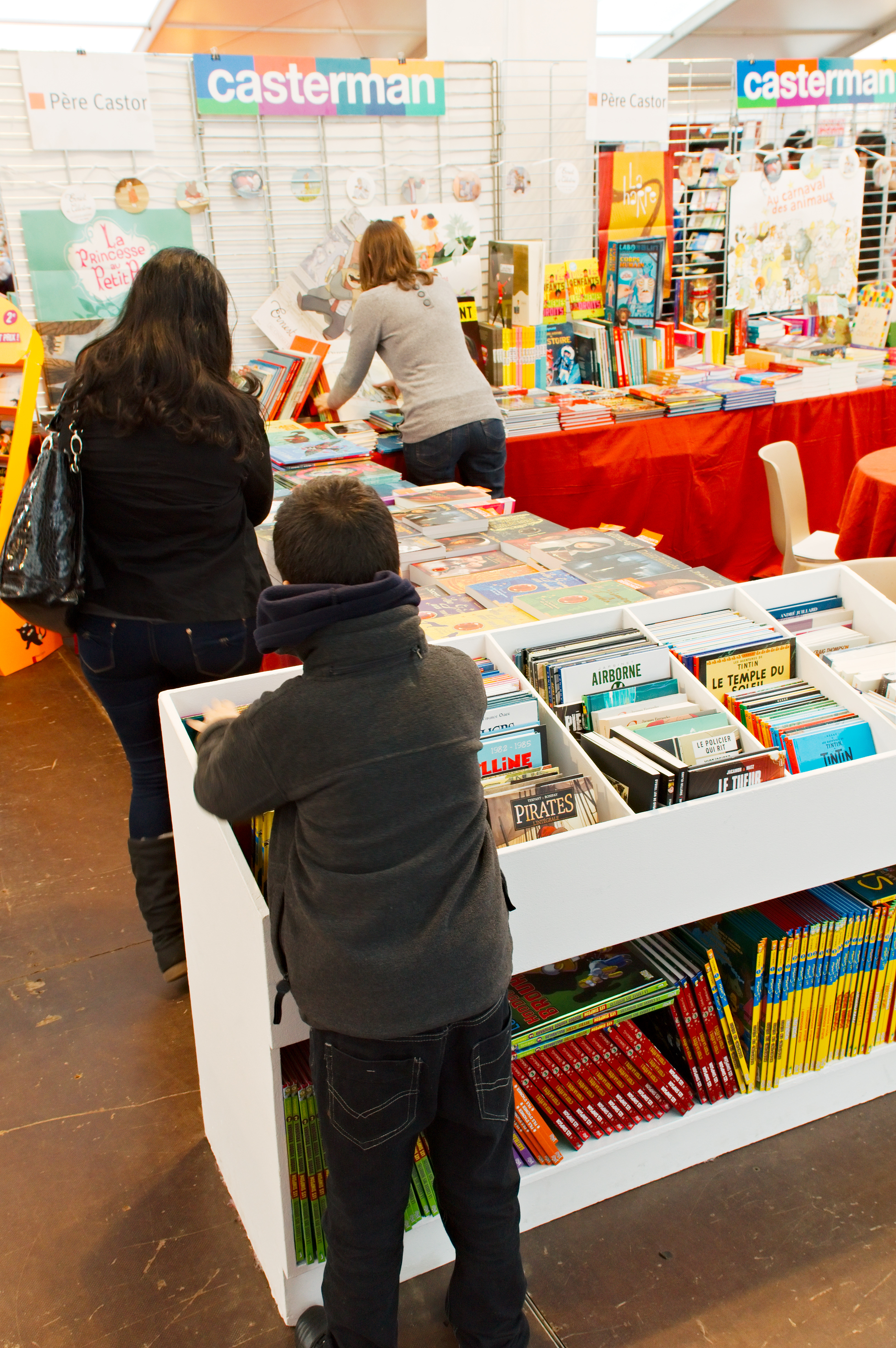 Stand Casterman au Festival du Livre de Jeunesse 2012 à Rouen.